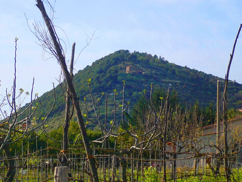 monte tresino dal lago a Castellabate (salerno)